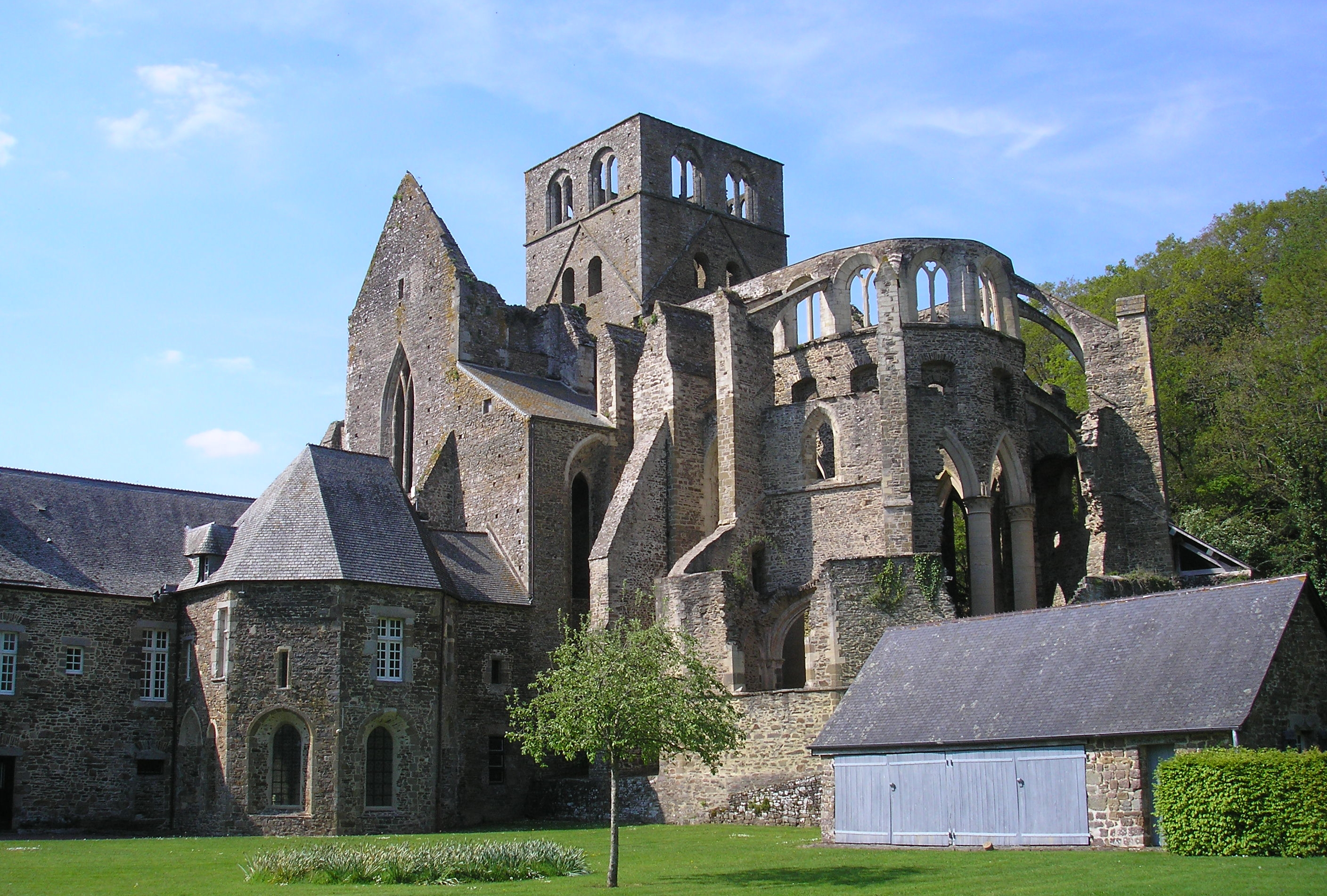 Hambye (Normandie, France). L'église abbatiale.